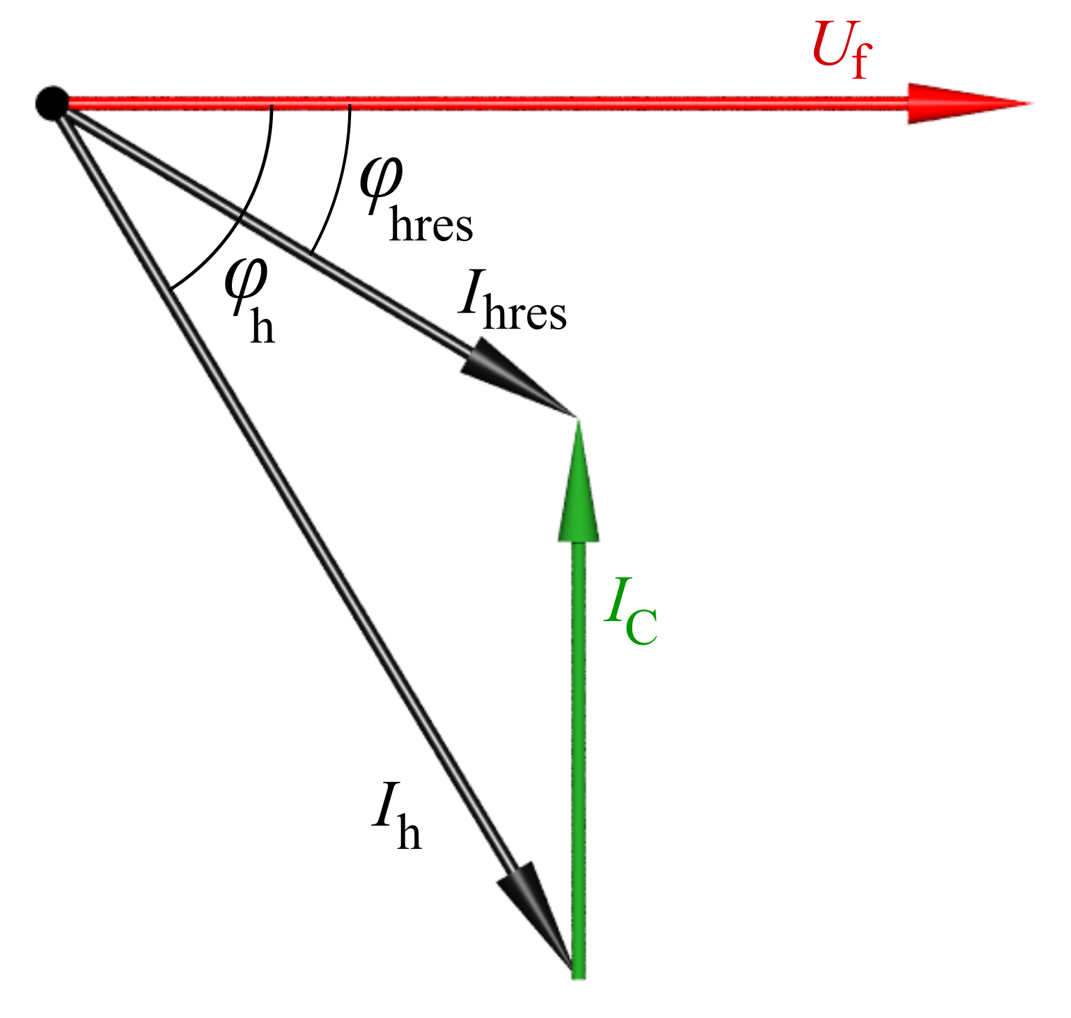 Faskompensering